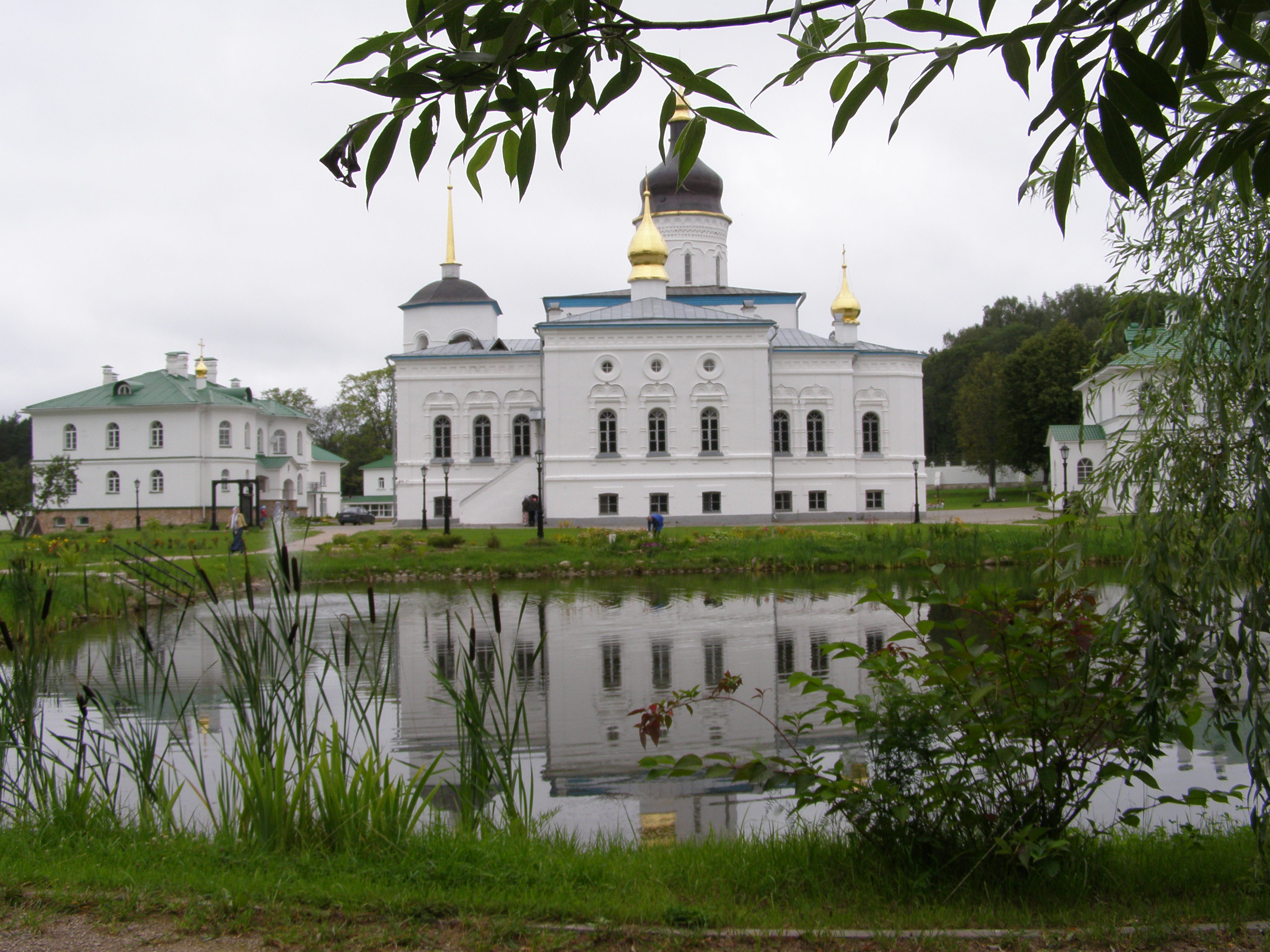 Монастырь Спасо-Елизаровский: Елизарово, Псковский район, Псковская область